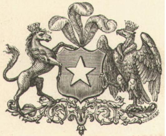 Versión errónea del Escudo de la República de Chile, en "Geografía física de la República de Chile", en donde se confundió al Huemul (entonces desconocido para otras culturas) con un Caballo. Además, se confundió la cola del caballo con la de otro animal no bien identificado.